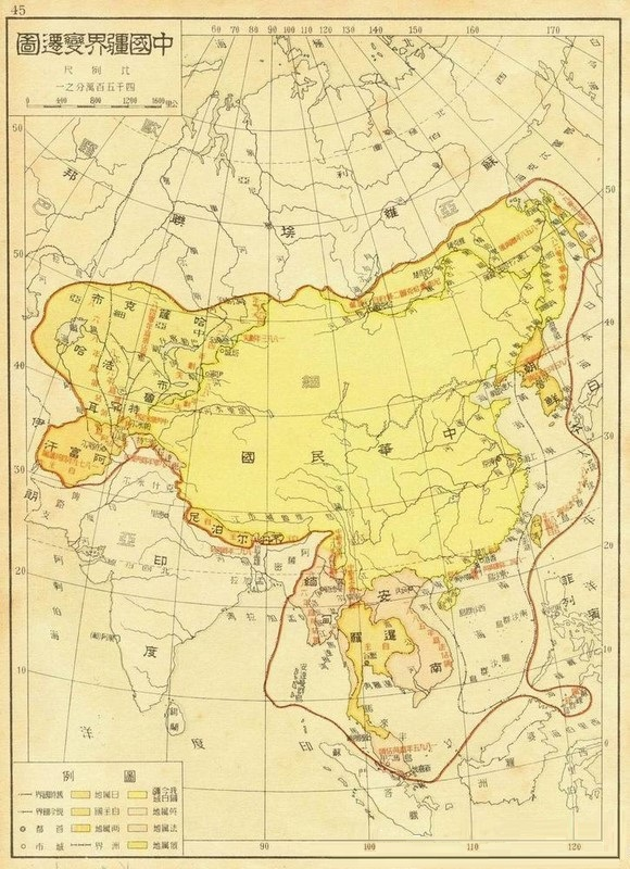 中國疆界變遷圖